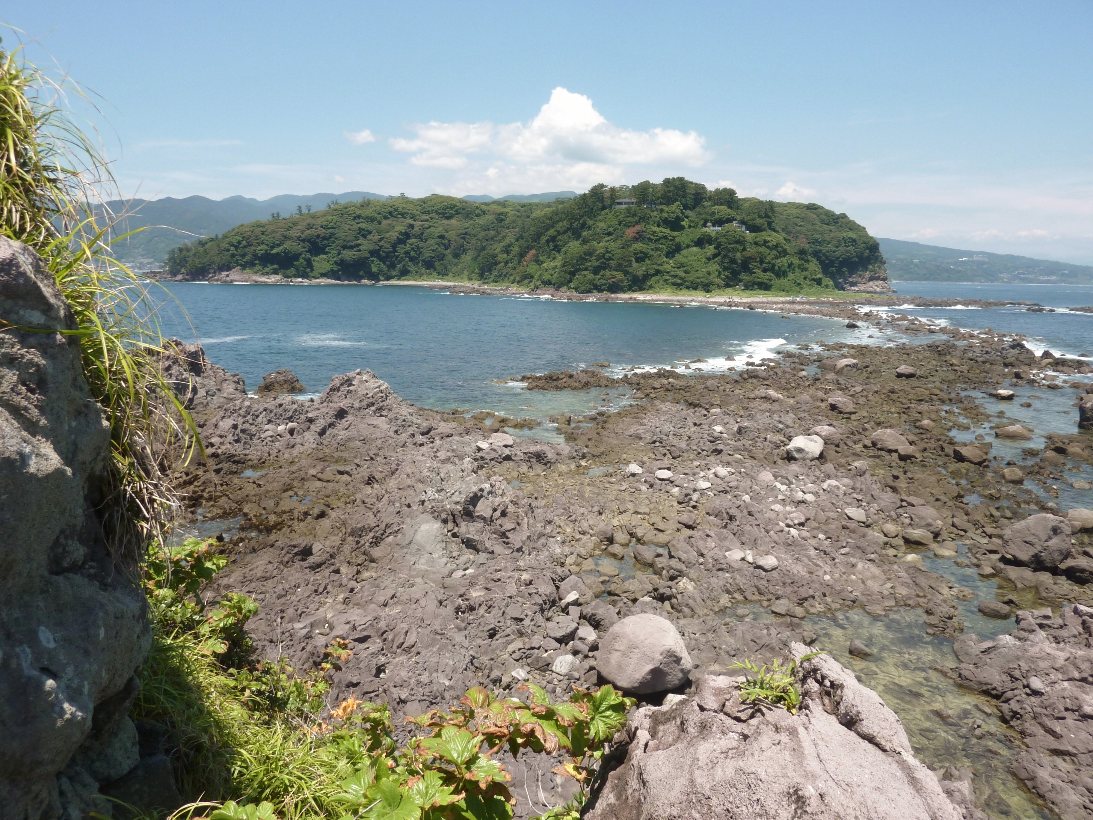 三ッ石から見た真鶴岬と三ッ石海岸（神奈川県真鶴町）